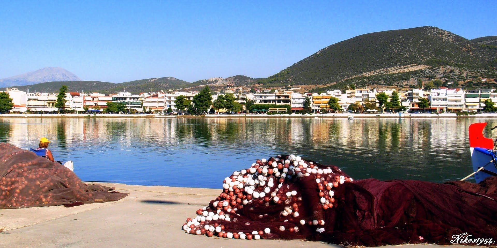 νέα Αρτάκη